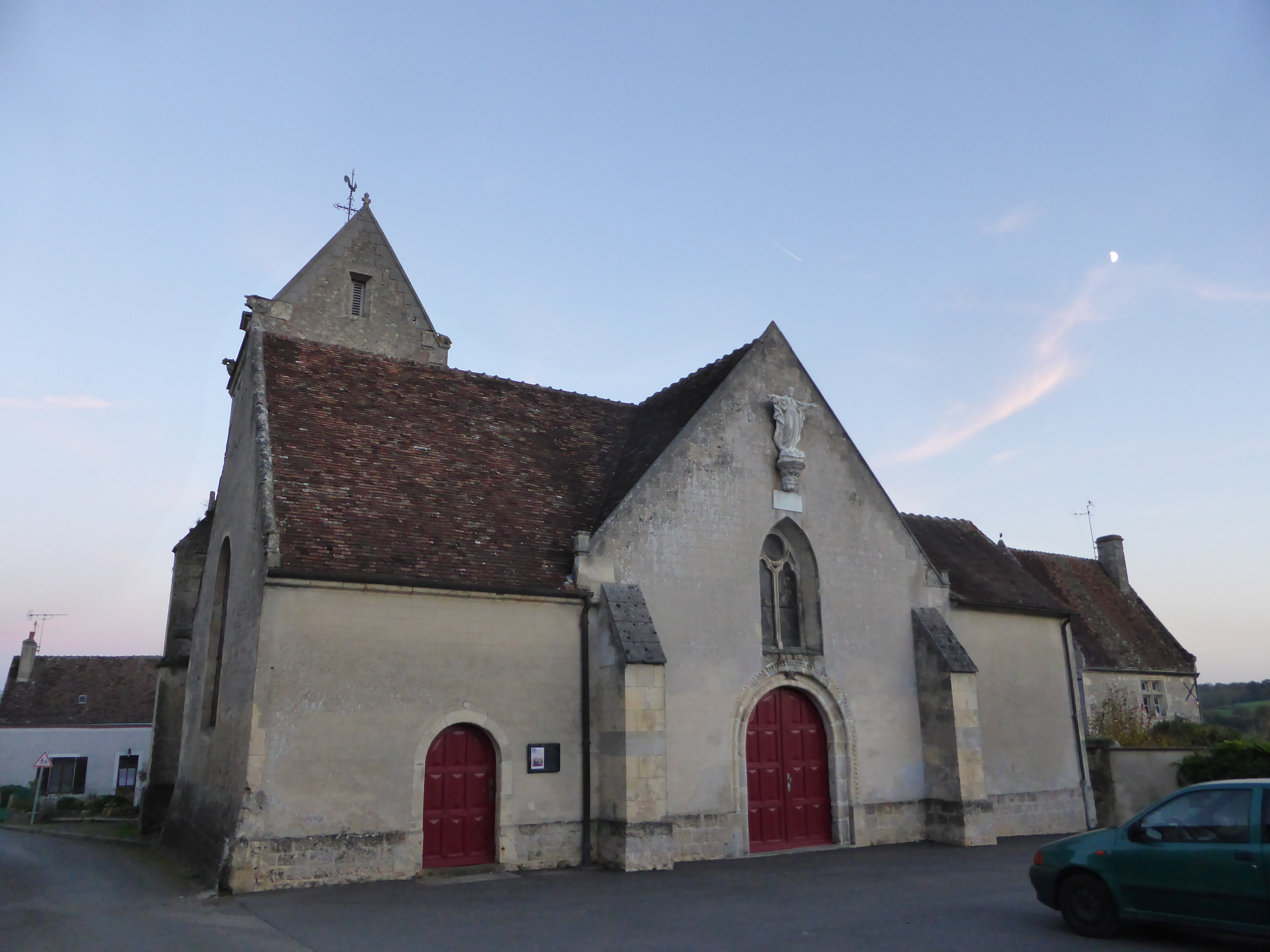 Église de Bellou-le-Trichard, dans l'Orne, en France.